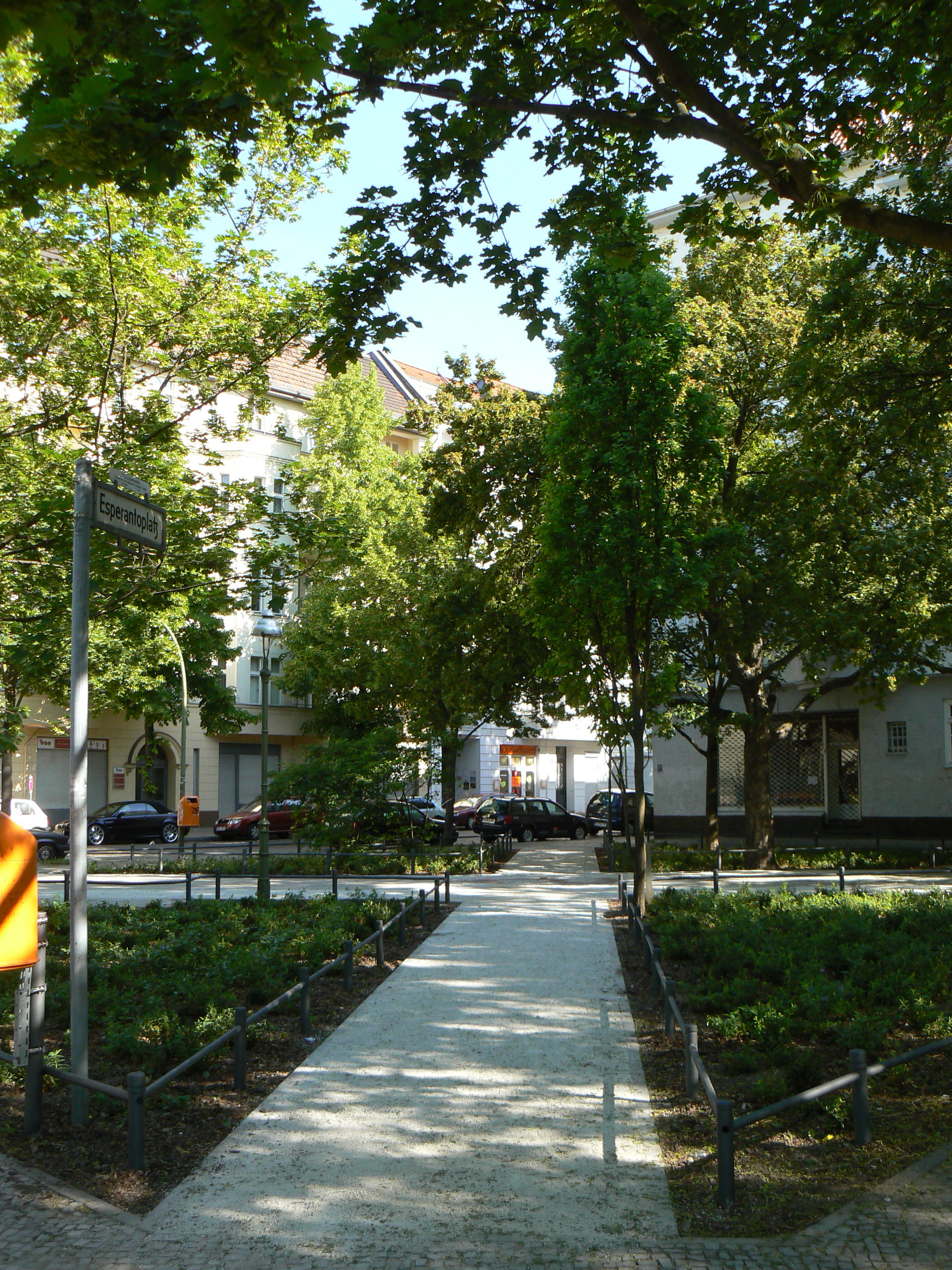 Esperantoplatz in Berlin-Neukölln